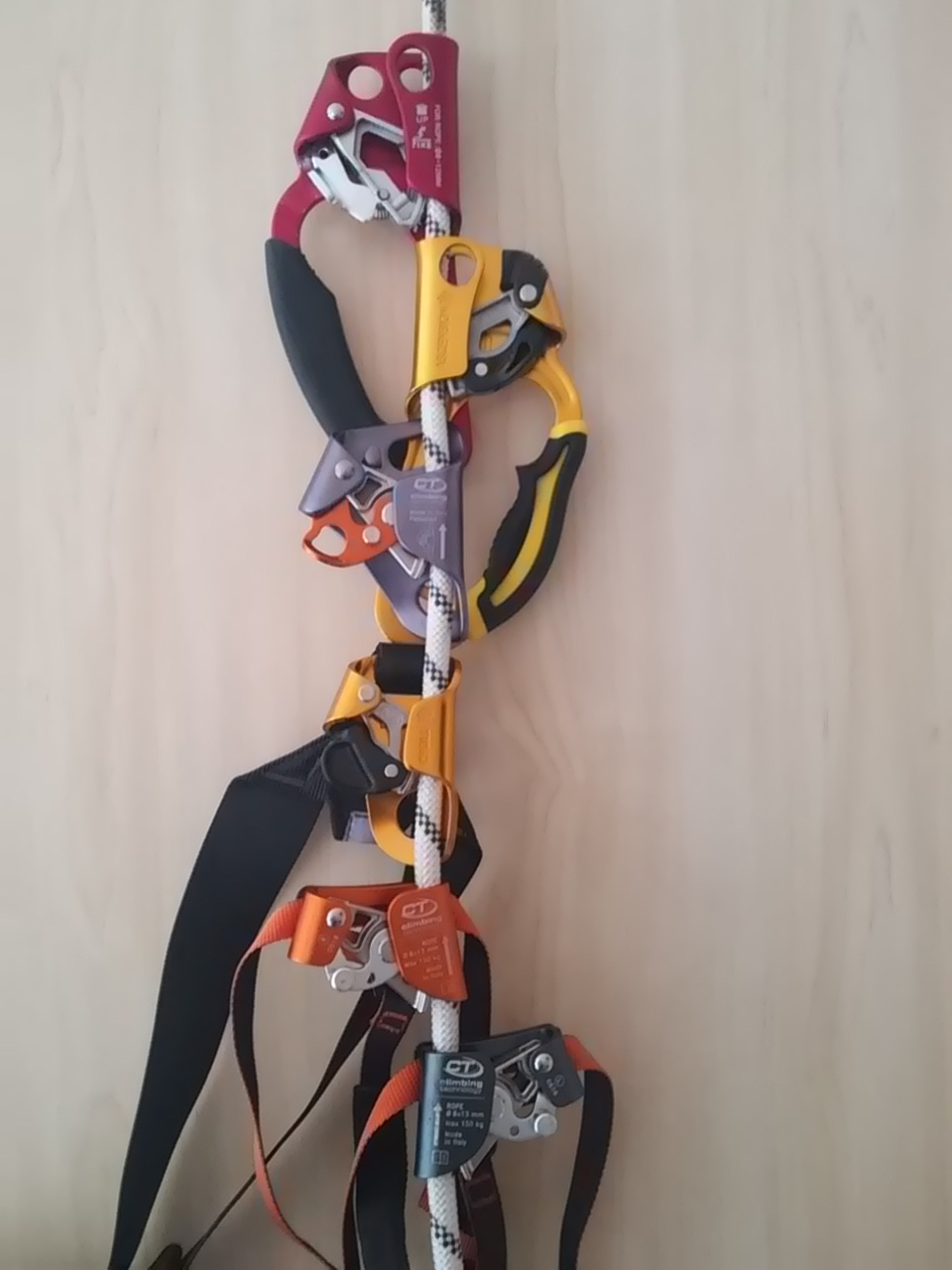 Steigklemmen verschiedener Hersteller - Oben: 2 Handsteigklemmen, Mitte: 2 hier verwendet als Bruststeigklemmen, Unten: 2 Fußsteigklemmen